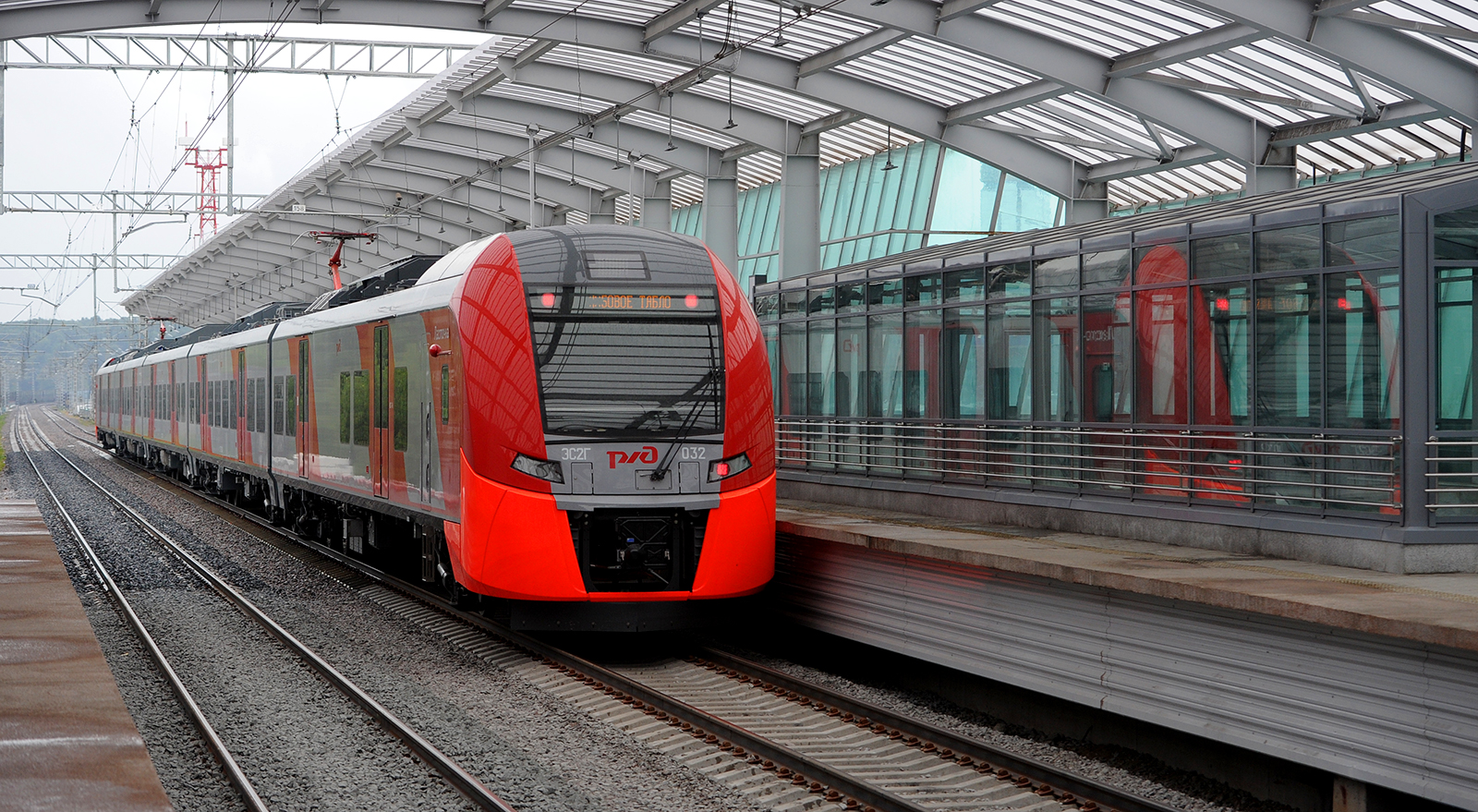 Электропоезд ЭС2Г-032 на платформе Лужники